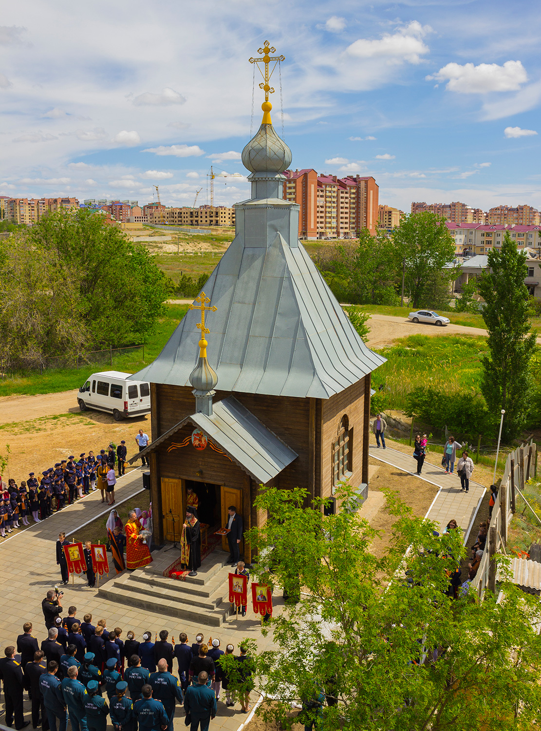 6 мая 2016 года, в день памяти святого великомученика Георгия Победоносца, архиепископ Юстиниан совершил Божественную литургию в храме-часовне Георгия Победоносца.